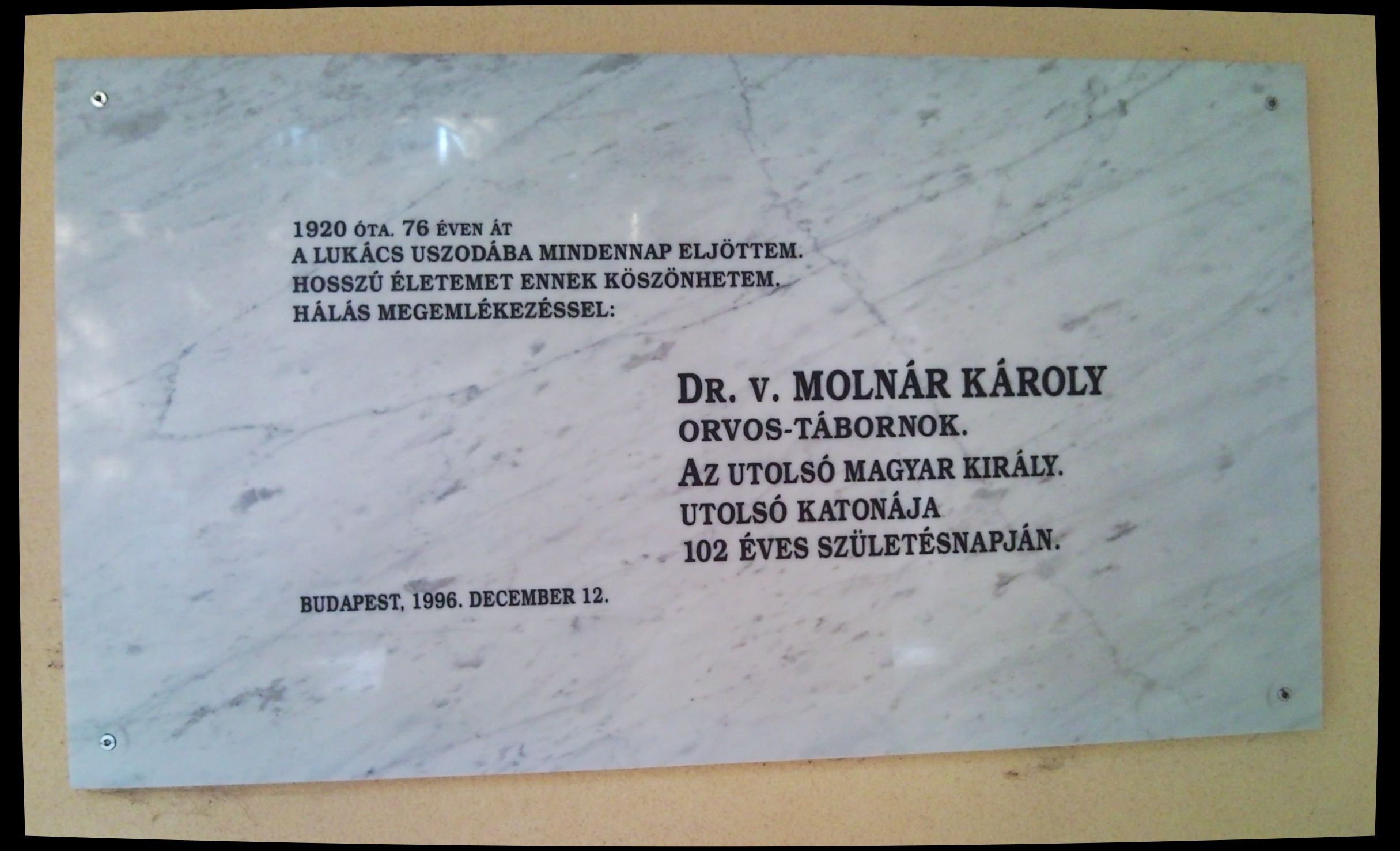 Molnár Károly emléktáblája a Lukács fürdőben (VII-es fénykép). Budapest II. kerület, Frankel Leó út 23-29.